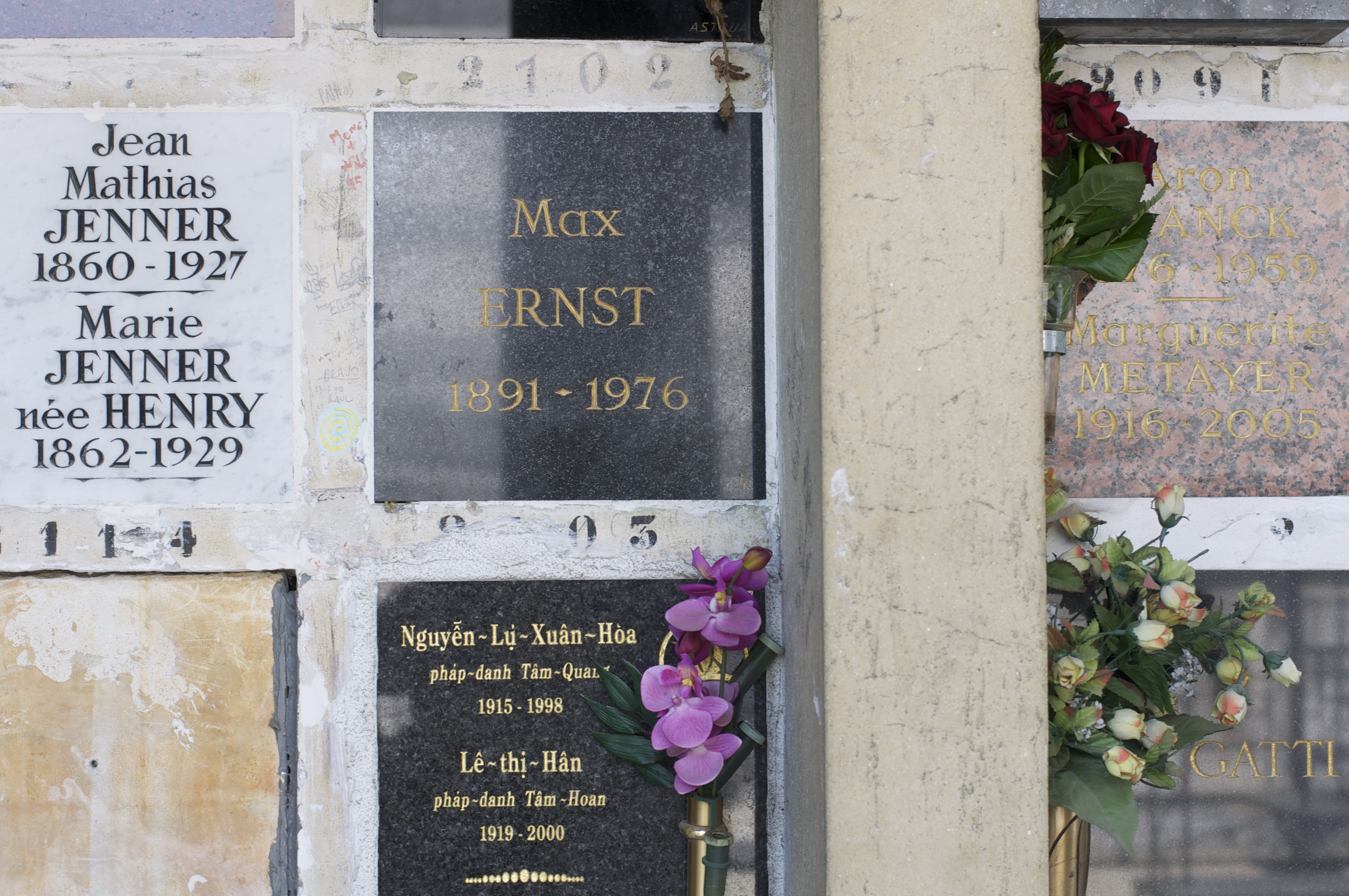 Cendres de Max Ernst déposées dans la case 2102 du columbarium du cimetière du Père-Lachaise.